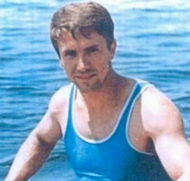 Aurel Vernescu